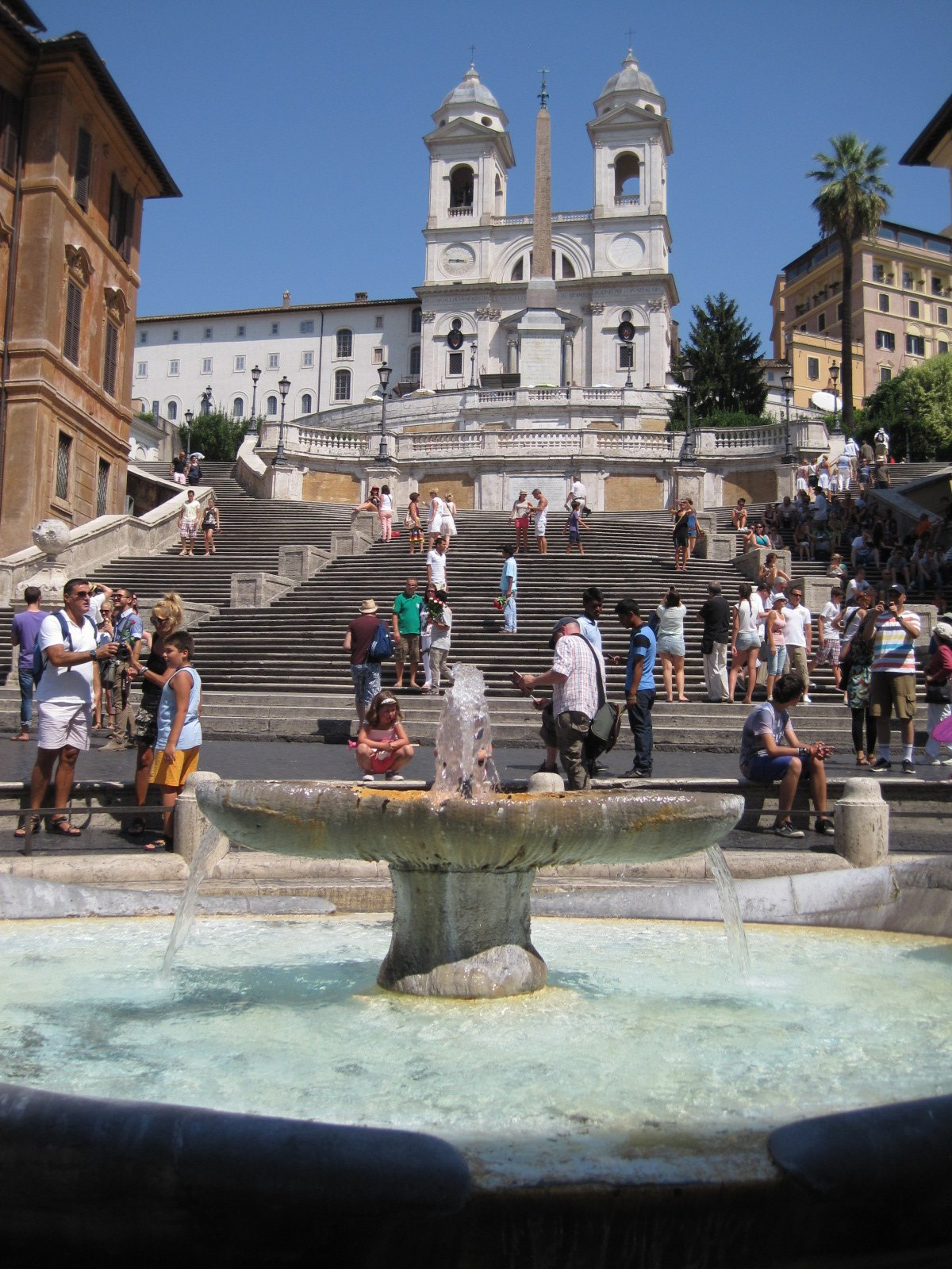 Fontana della Barcaccia - Trinità dei Monti - Piazza di Spagna - Rome